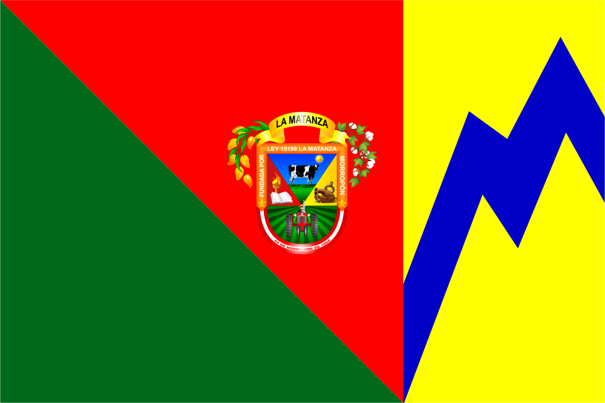 Distrito de La Matanza - Provincia de Morropón - Región Piura